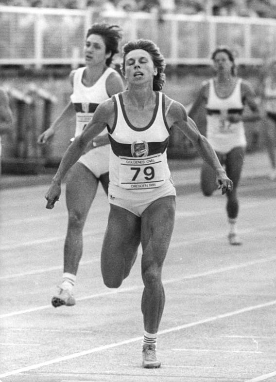 Marita Koch, Petra Müller ADN-ZB Thieme 17.8.86 Dresden: Goldenes Oval- Zu den Höhepunkten am ersten Tag (16.8.86) des Leichtathletik-Sportfestes "Goldenes Oval" im Dresdner Heinz-Steyer-Stadion gehörte das 400-m-Rennen der Frauen. Weltrekordlerin Marita Koch (SC Empor Rostock- vorn) stellte in ihrem ersten 400-m- Lauf der Saison mit 49,24 s eine neue Jahresweltbestleistung auf und zog dabei Petra Müller (SC Chemie Halle- l.) zur persönlichen Bestzeit von 49,79 s mit.